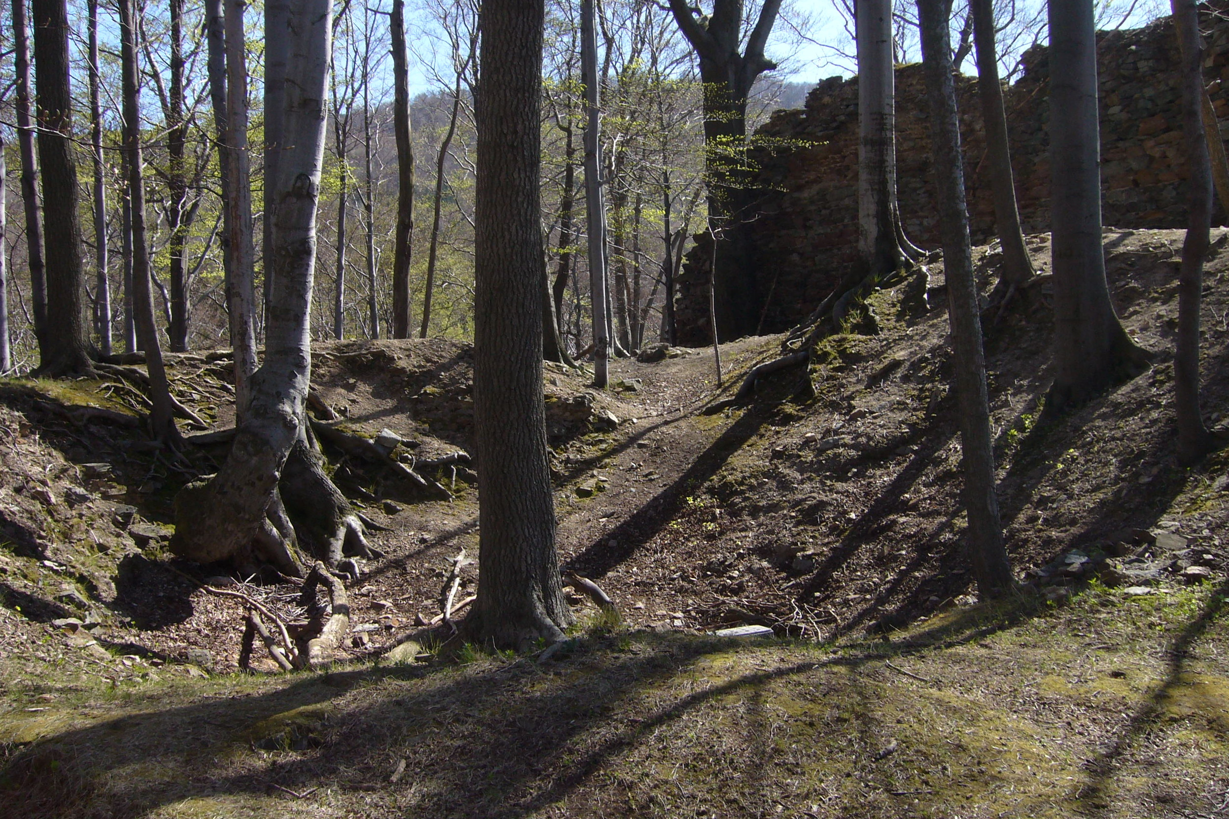 Raimund – pozůstatky hradního paláce s plášťovou hradbou v pozadí